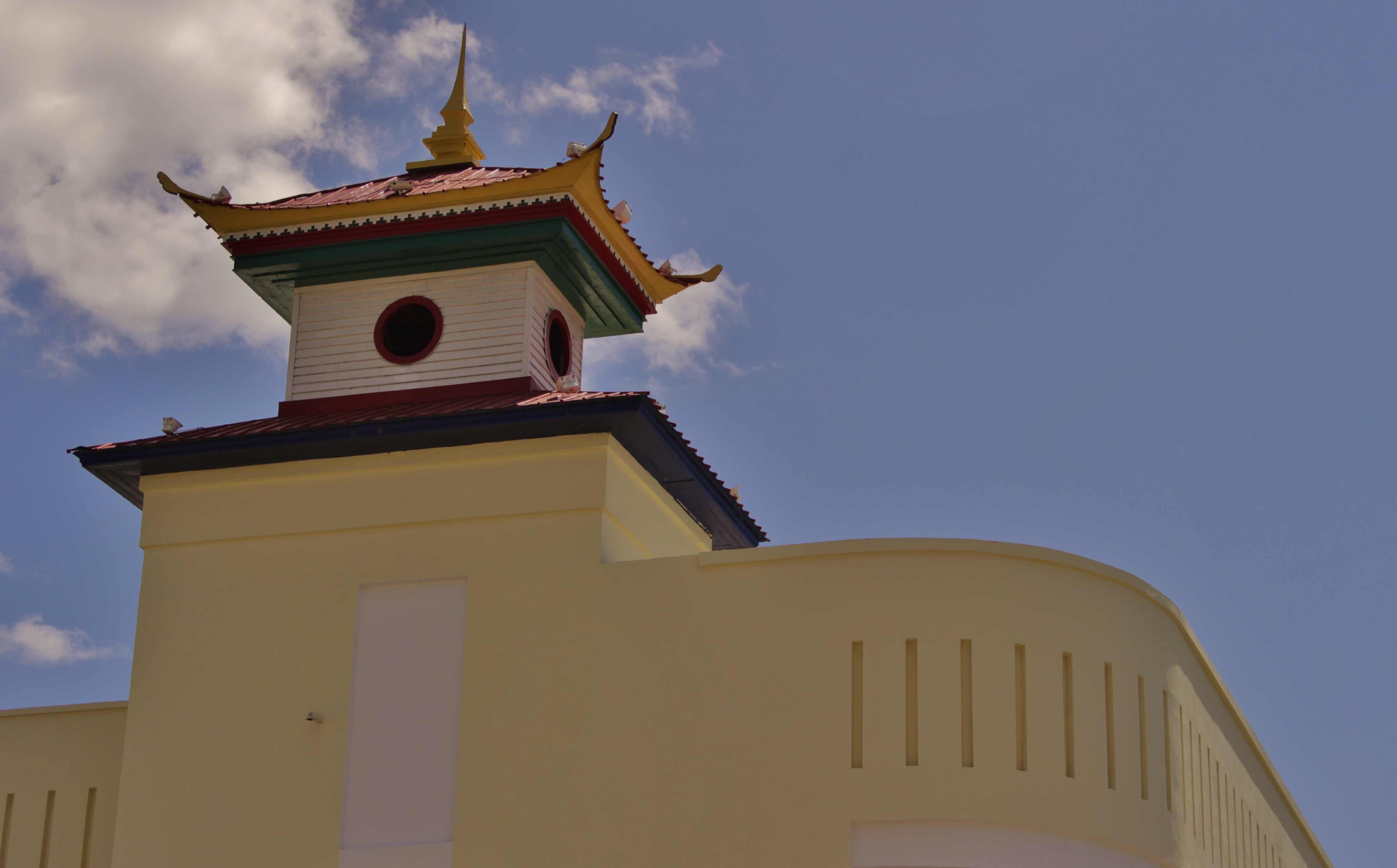 Фрагмент здания мэрии пгт Агинское Забайкальского края